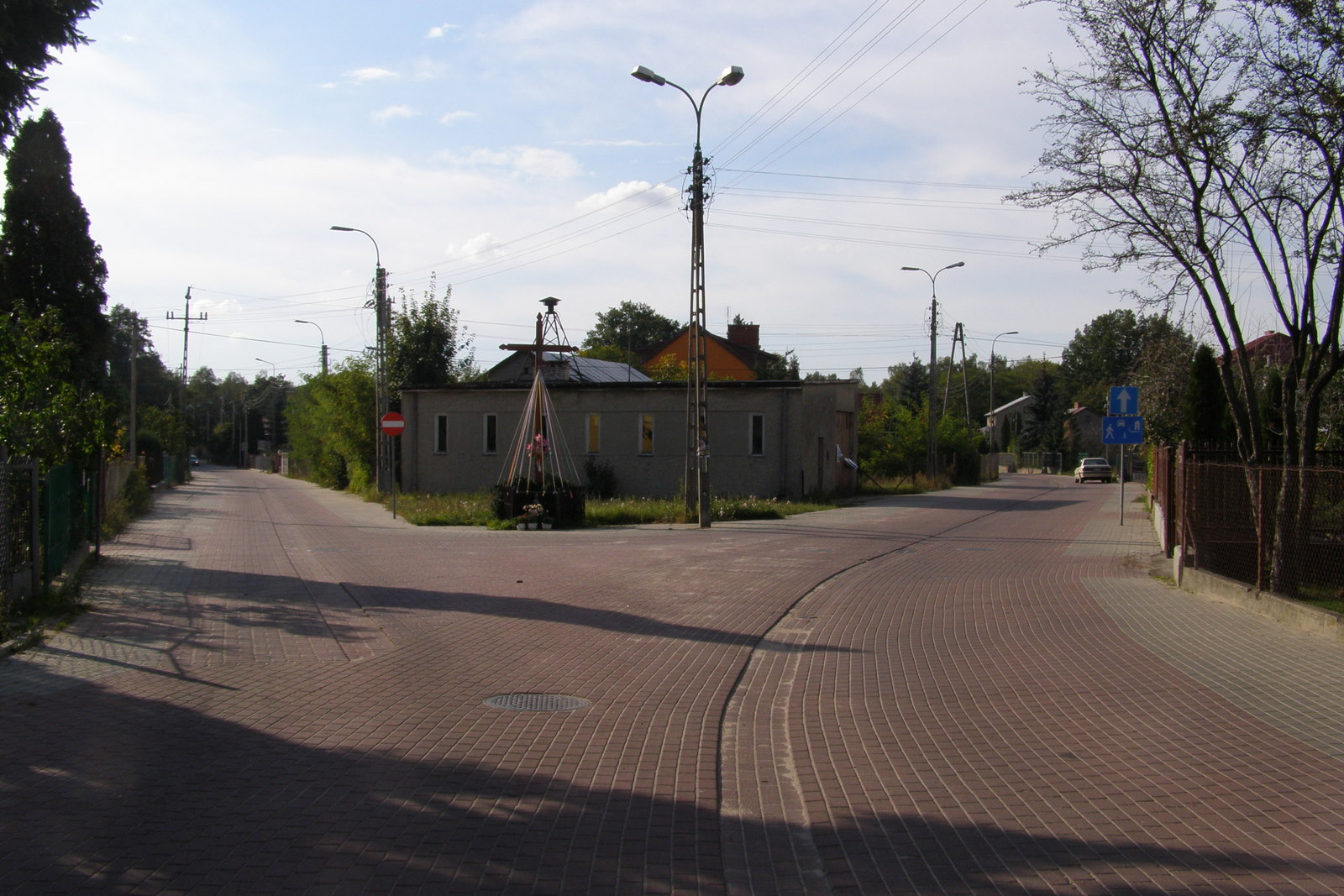 Former Anielina Village in Mińsk Mazowiecki / Dawna wieś Anielina w Mińsku Mazowieckim